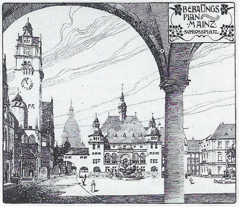 Bild des Schlossplatzes des Kurfürstlichen Schlosses auf dem Bebauungsplan der Denkmalzone Albinistraße von Friedrich Pützer (1871–1922)